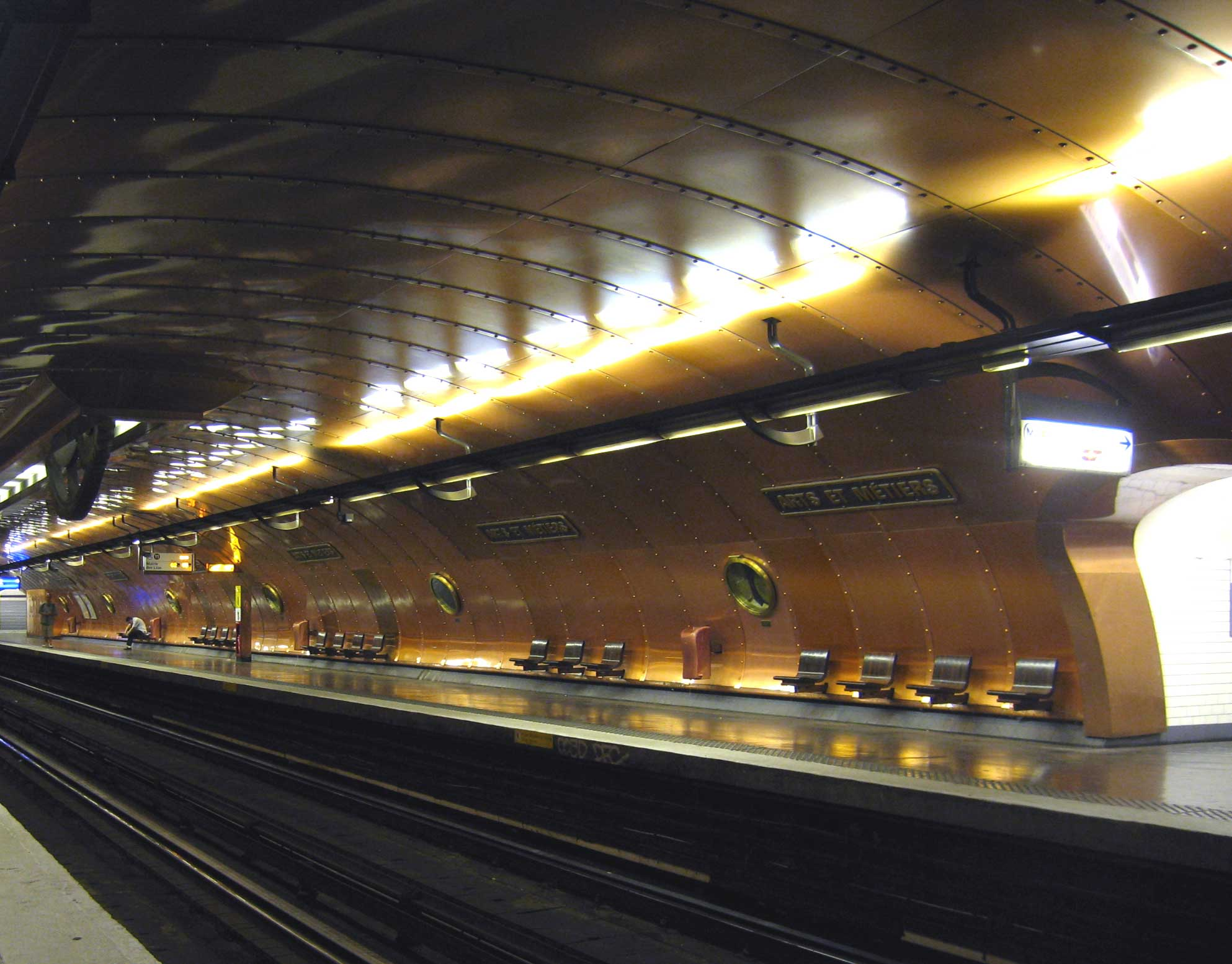 Description : Station Arts et Métiers sur la ligne 11; Une décoration qui s'inspire de 20 000 lieux sous les mers Place : Paris, France Date : juillet 2006 Author : Pline photo personnelle